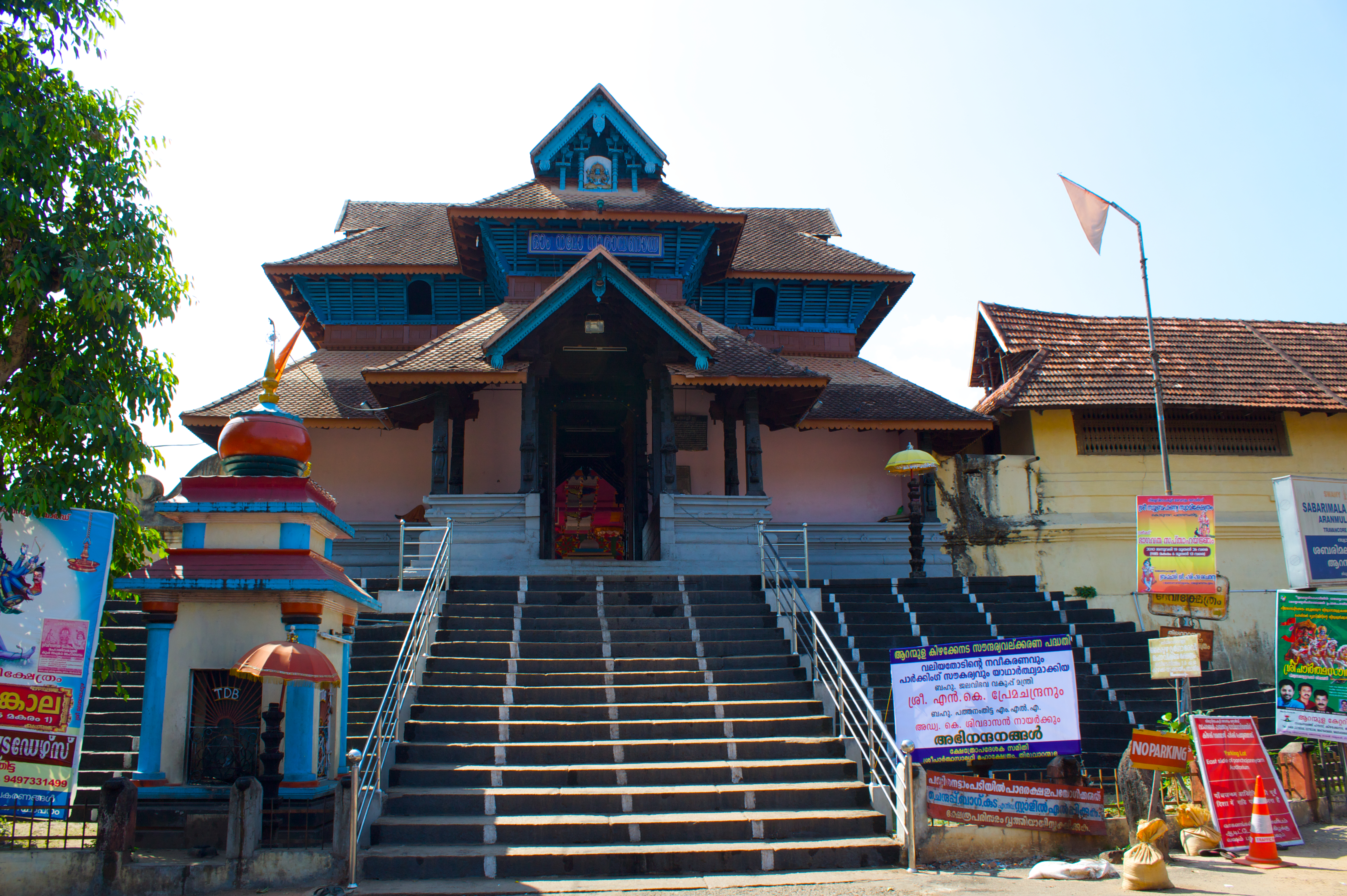 ആറന്മുള ശ്രീ പാർത്ഥസാരഥിക്ഷേത്രം